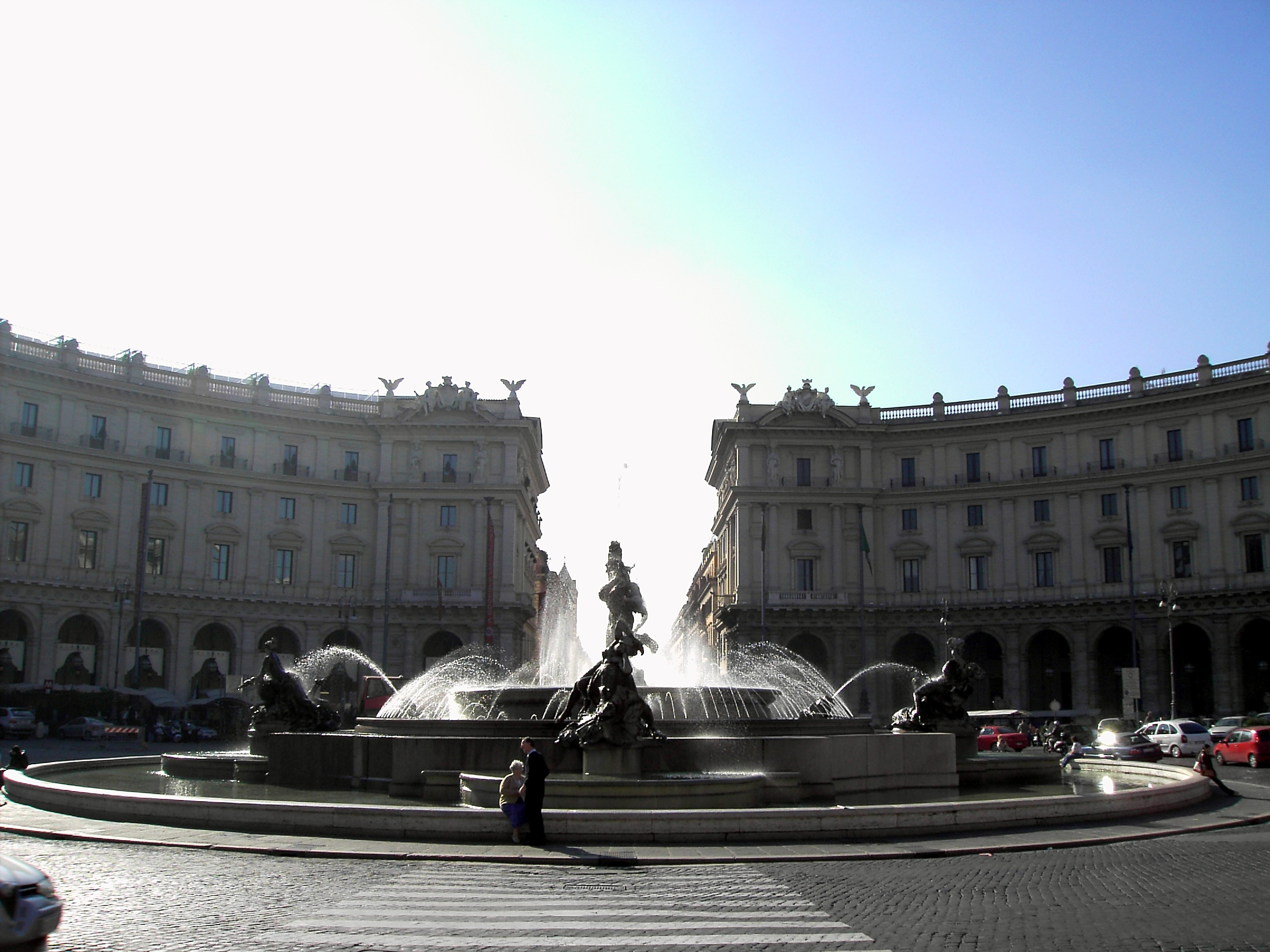 Mario Rutelli, Scultura della fontana delle Najadi. Roma, piazza Esedra.